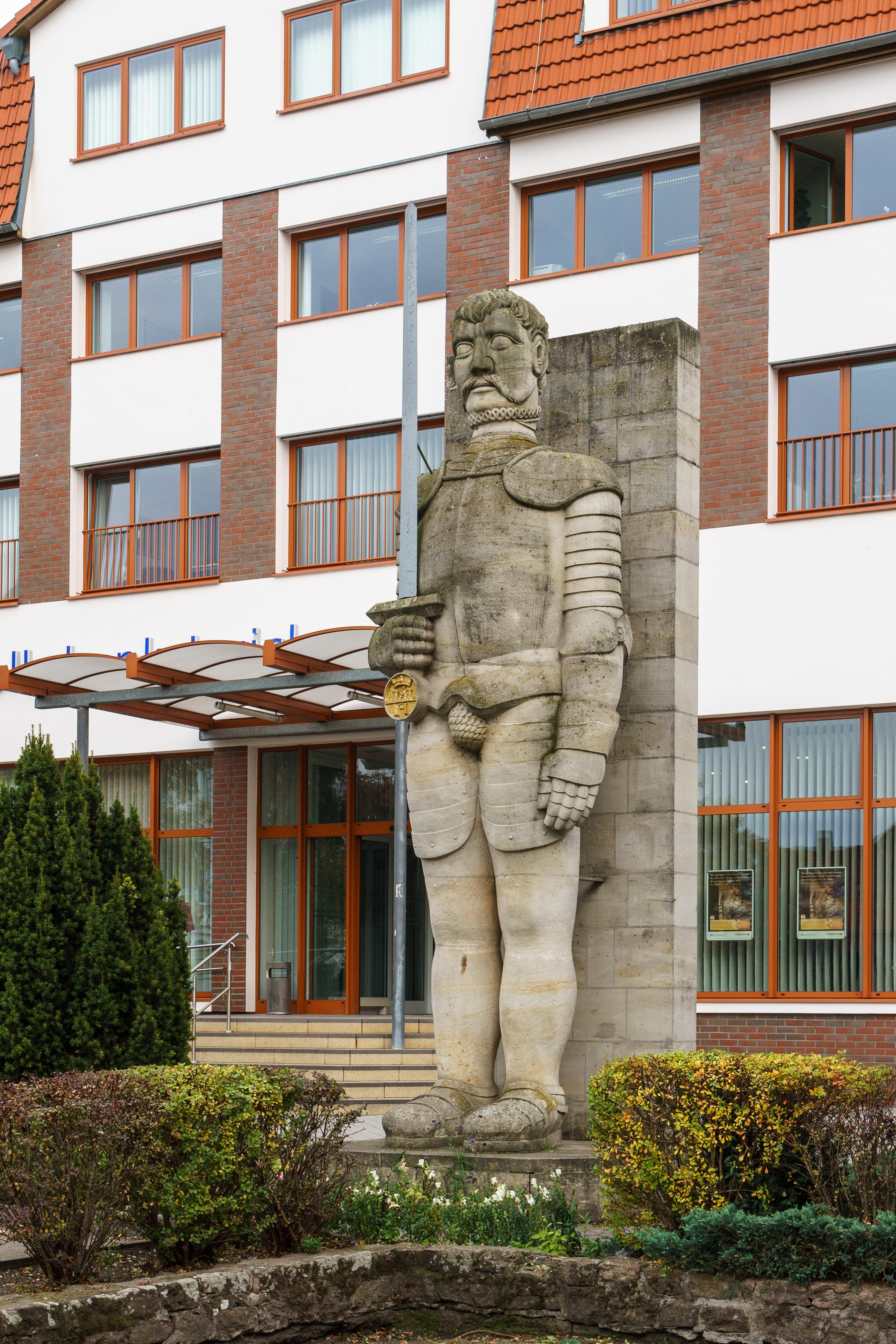 Burger Roland auf dem Rolandplatz in Burg (bei Magdeburg)